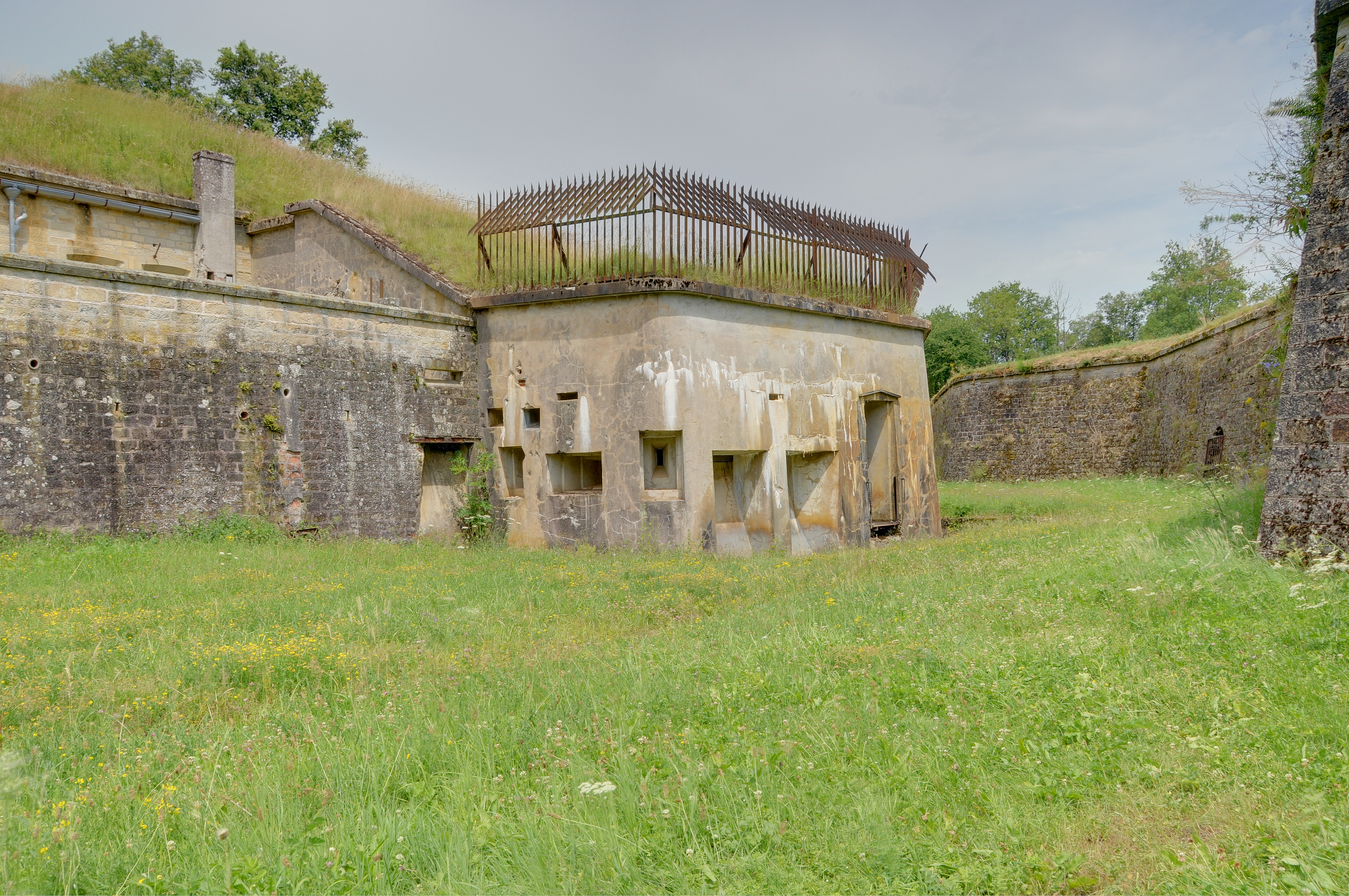 Caponnière de saillant V (HDR).